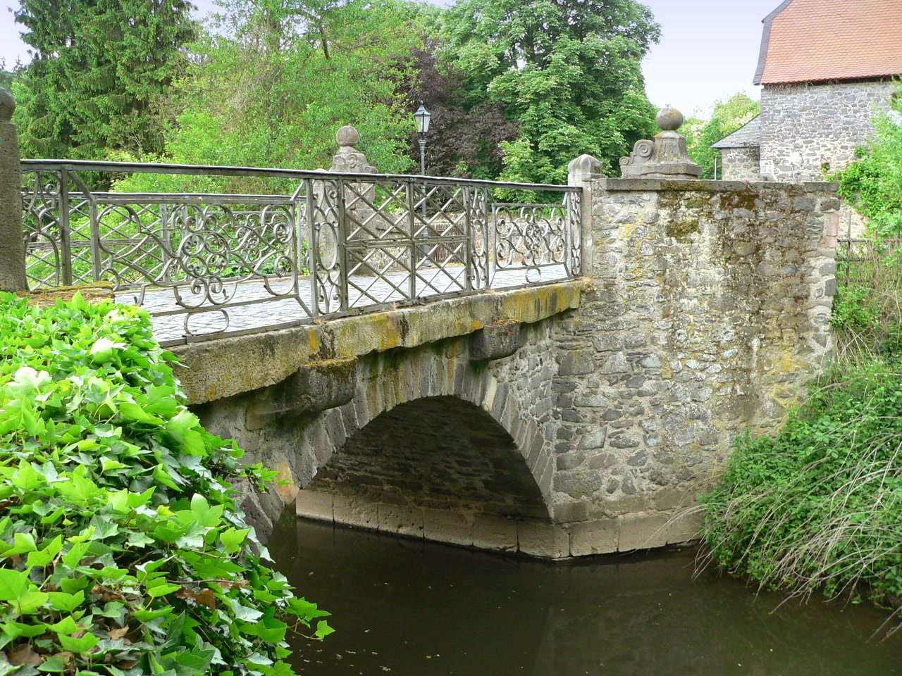 Brücke über die Wetter Kloster Arnsburg bei Lich, Hessen, Germany